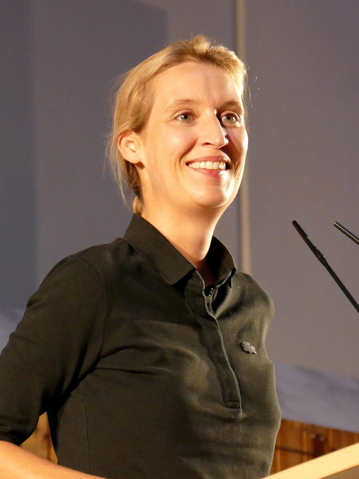 Alice Weidel bei einer AfD-Informationsveranstaltung - Schriesheim, 22.7.2017